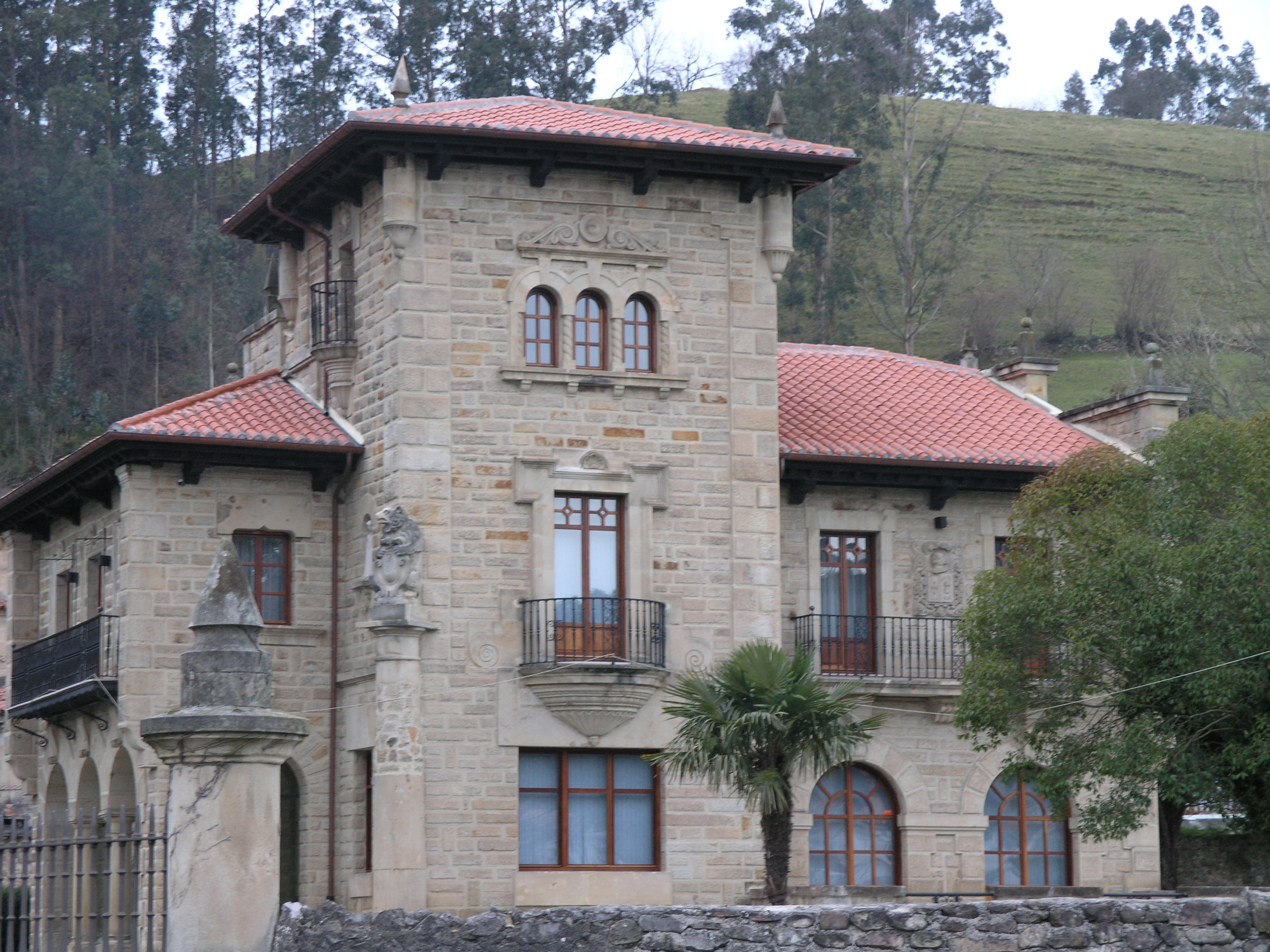 Detalle de la Casona de Fuentes-Pila, proyectada por el arquitecto Javier González de Riancho (1928). Actual Ayuntamiento de Puente Viesgo.